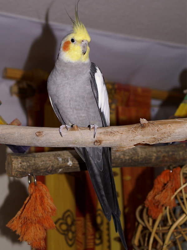 Nymphensittich-Hahn-Wildfarben